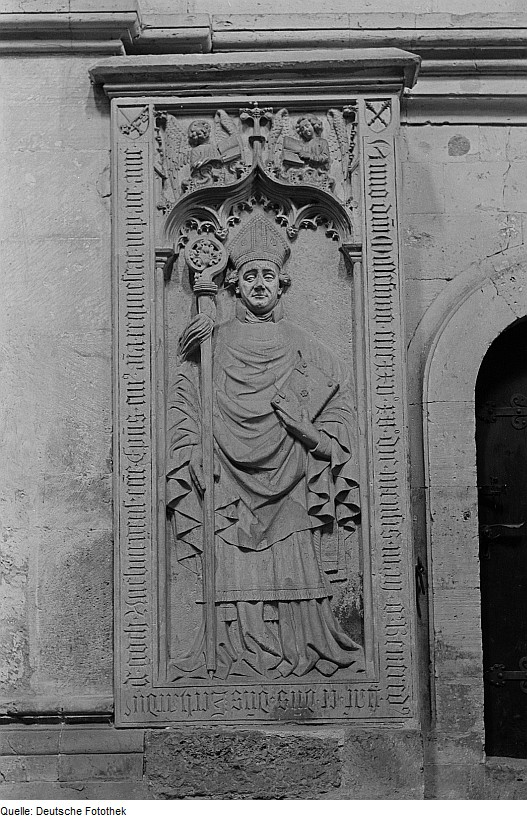 Original image description from the Deutsche FotothekSteinrelief Epitaph des Naumburger Bischofs Gerhard II. von Goch (1409-1422)